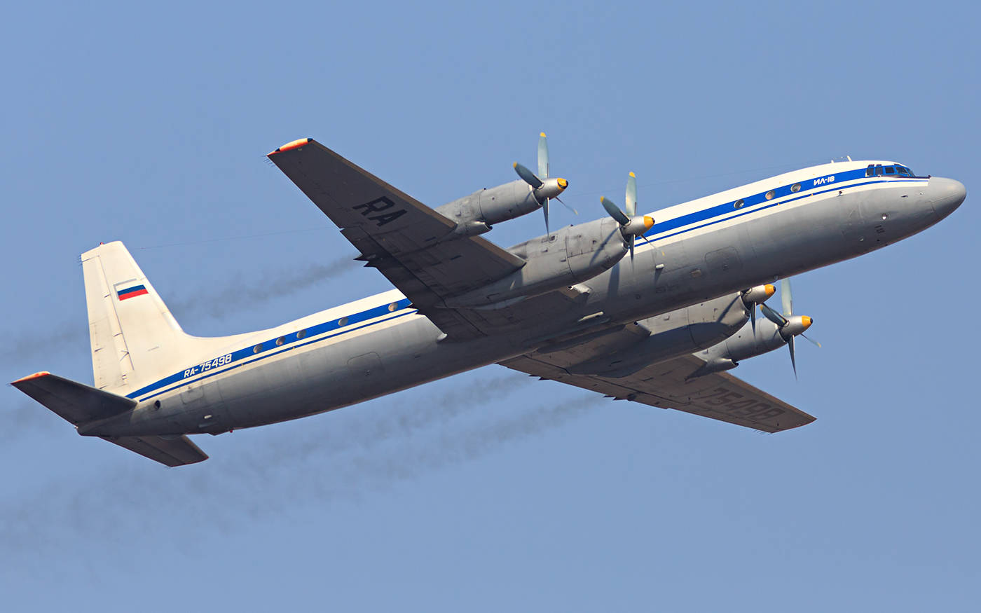 _VO_7863